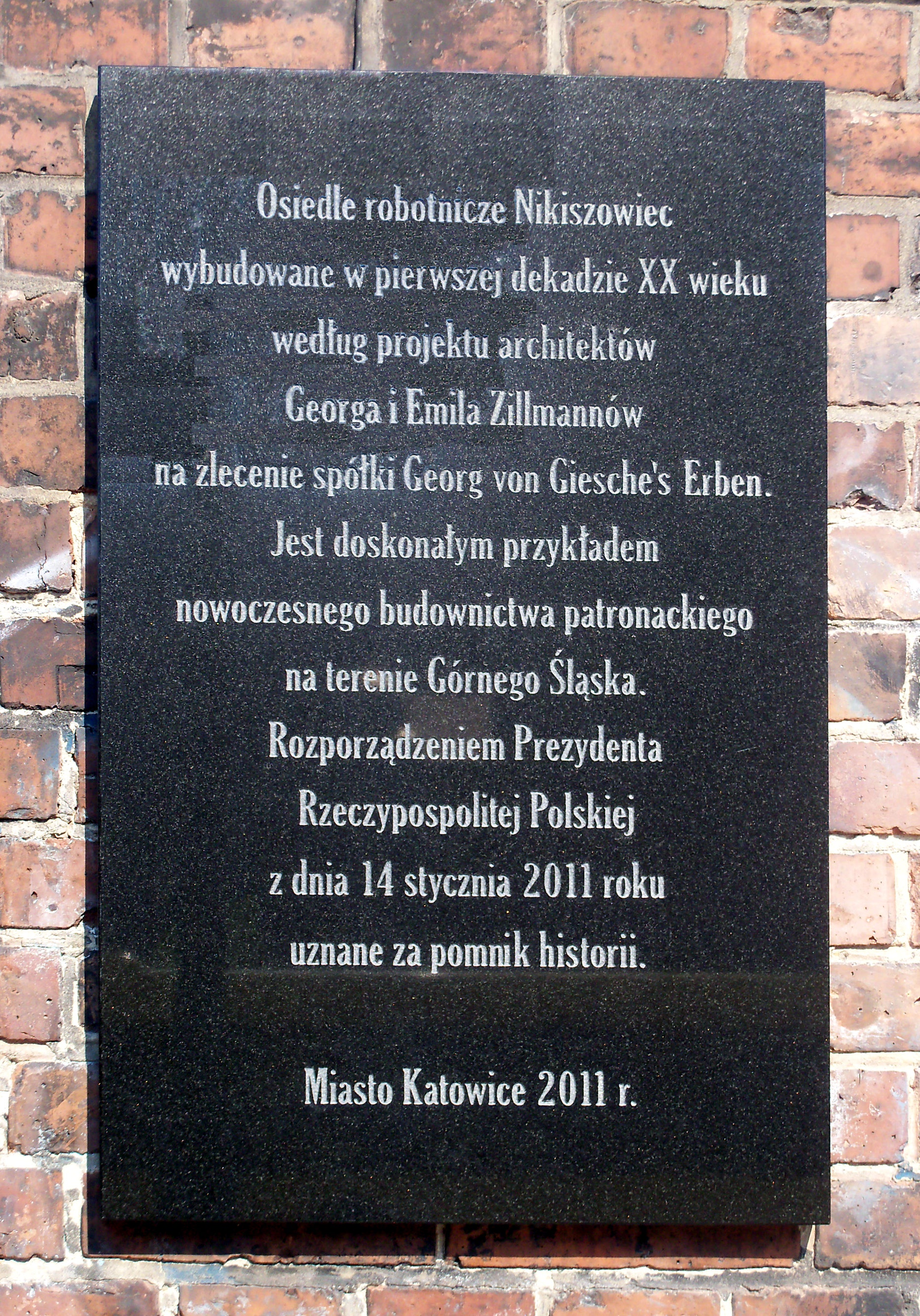 Tablica pamiątkowa na budynku przy pl. Wyzwolenia w Nikiszowcu, w Katowicach